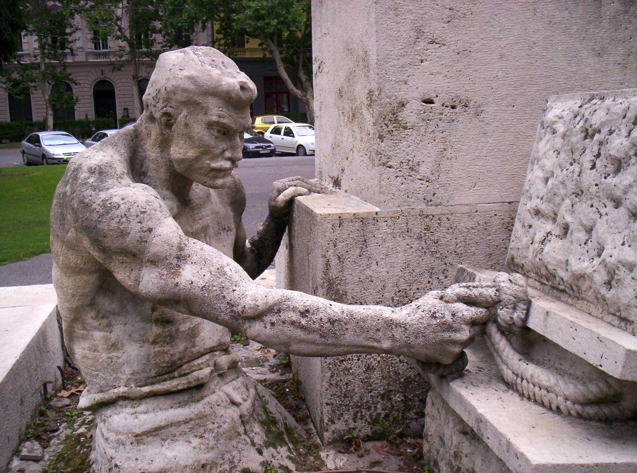 A szegedi Tisza Lajos-szobor (Fadrusz János) egyik mellékalakja. Rulinger-Gaál Rezső alkotása (1903)